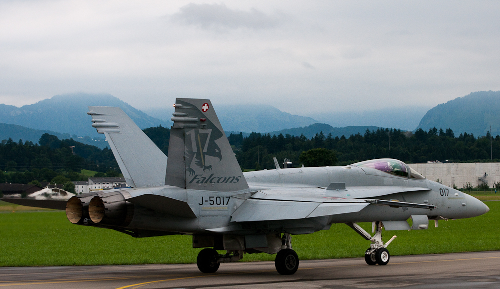 20100724-_DSC8620